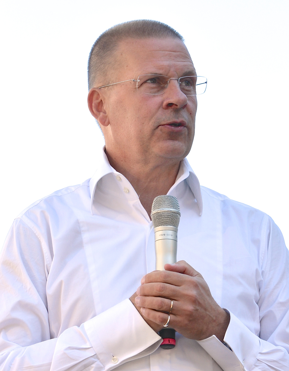 Benny Fredriksson på Sergels torg under Stockholms Kulturfestival 2013. Smakprover ges ur den kommande säsongens föreställningar på Stockholms Stadsteater.